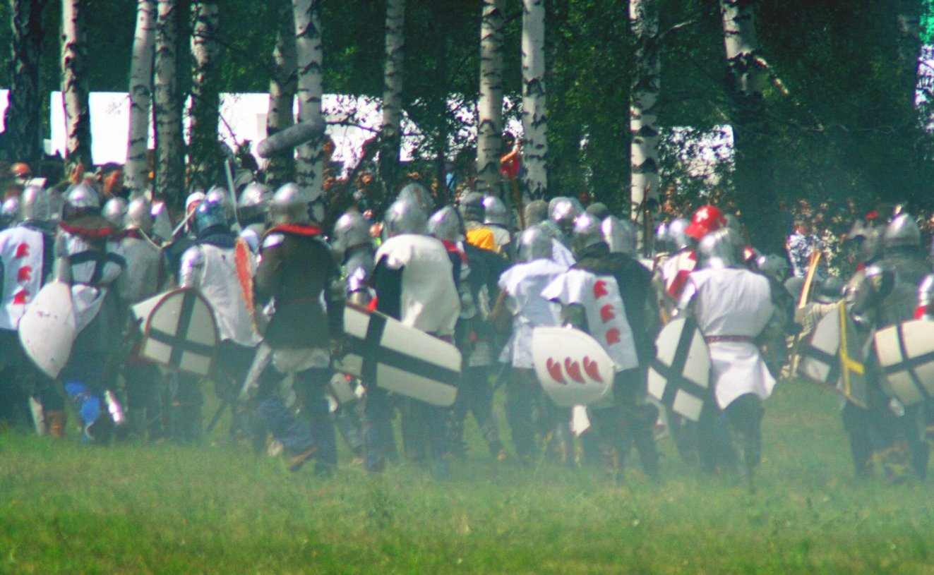 15.07.2006, inscenizacja bitwy pod Grunwaldem.